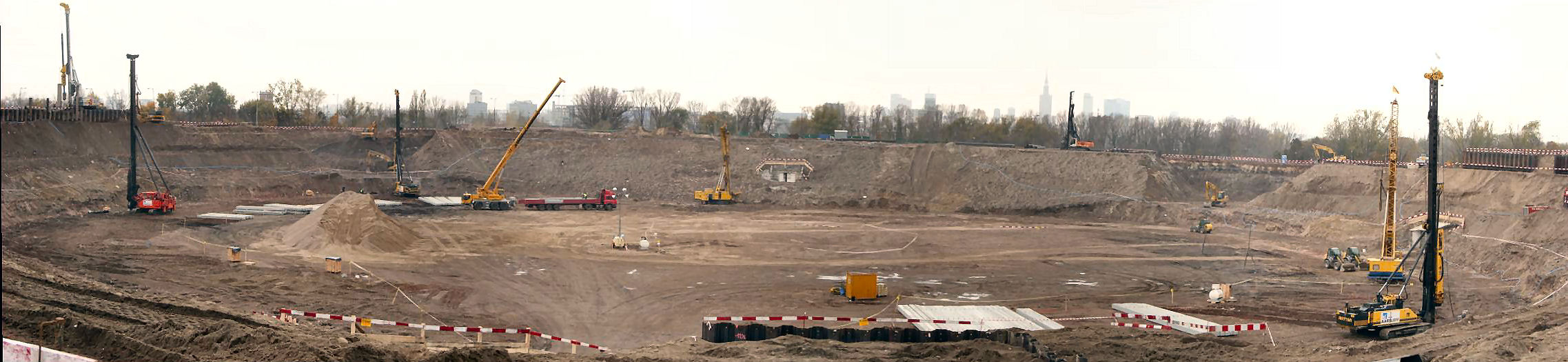 Budowa Stadionu Narodowego w Warszawie